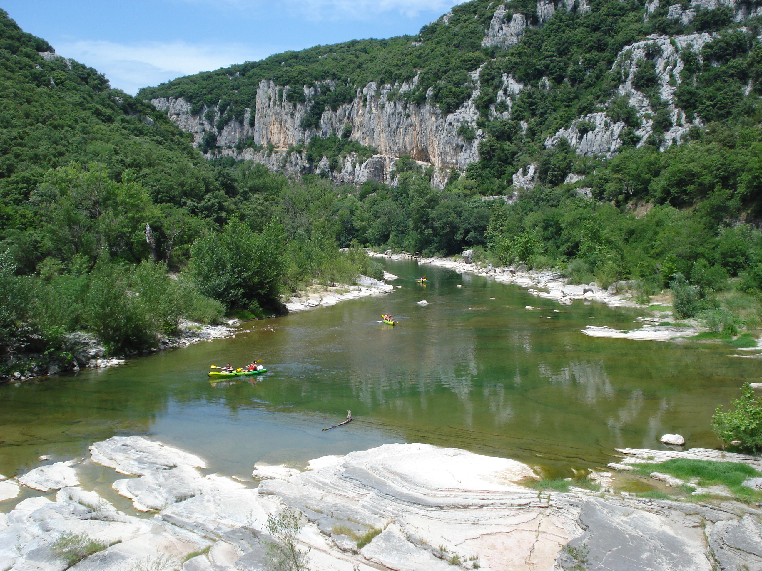 L'Hérault en amont de Saint-Bauzille-de-Putois.